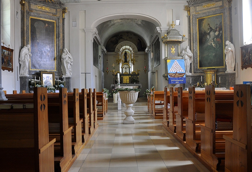 Kirche Maria Loretto, Jedelsee (Wien)